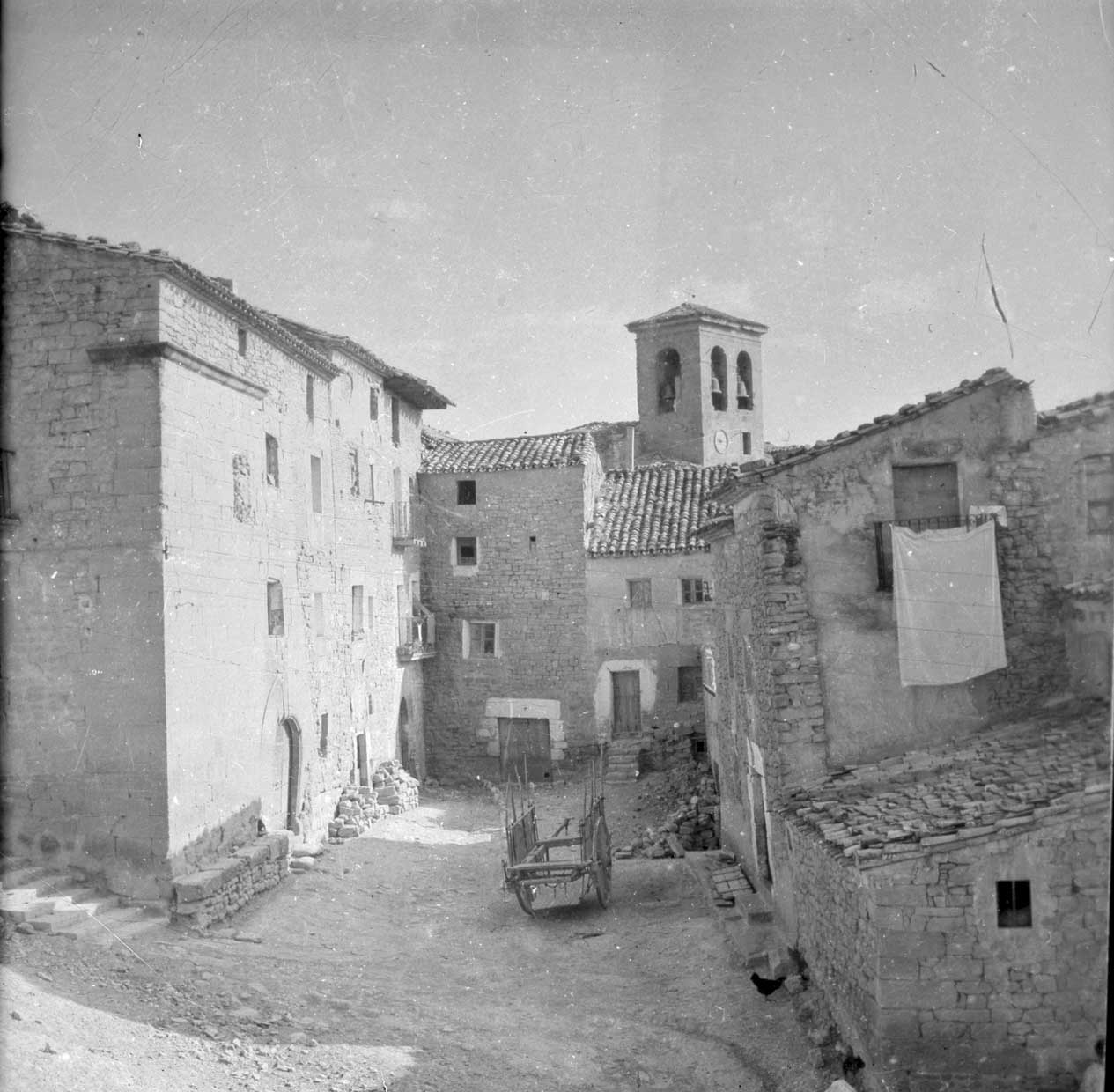 Bargotako eliza.